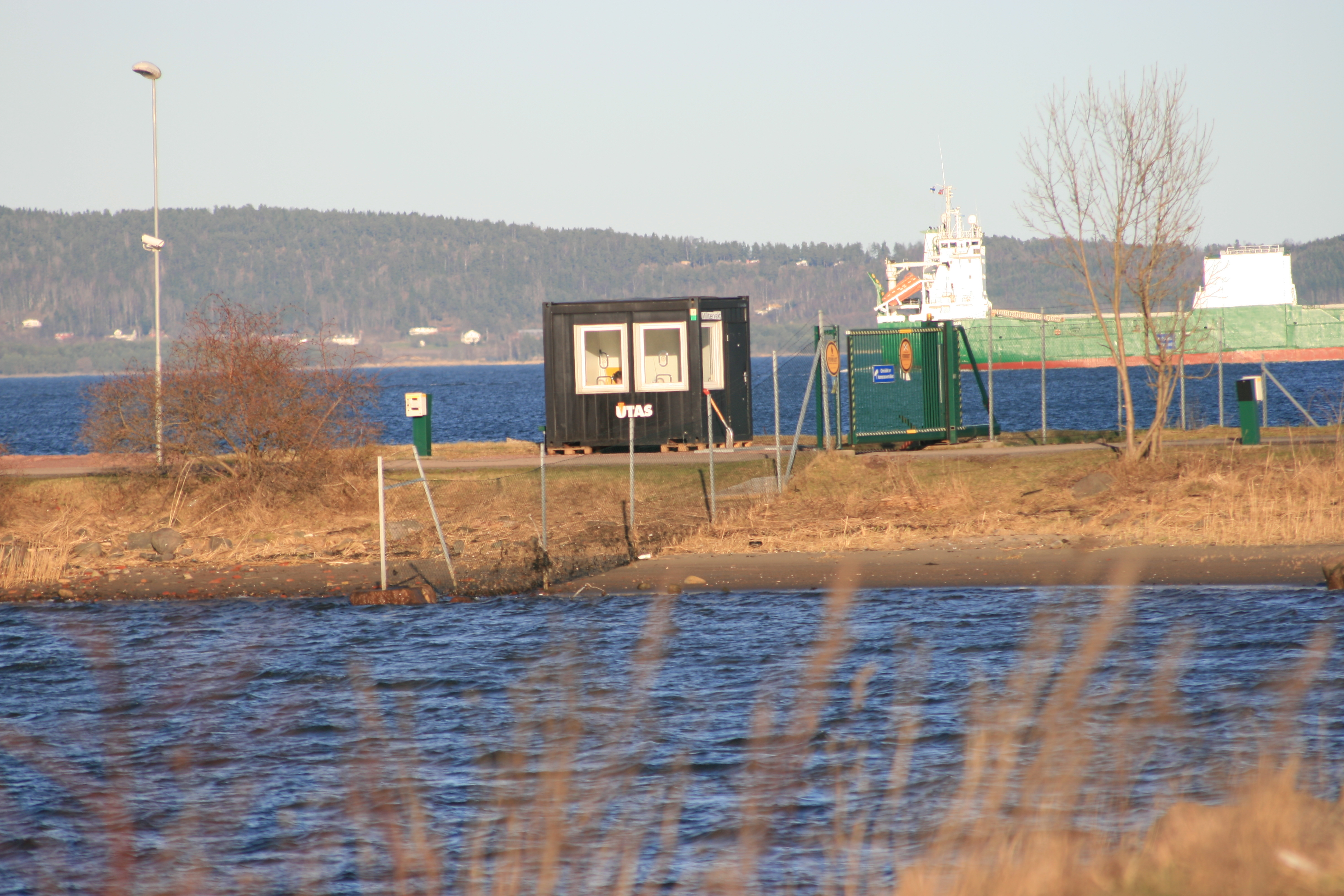 Militær kontrollpost ved veien ut til Vealøs. Hele øyen er fremdeles militært område, og området er sperret av med gjerder, videovervåking og vaktbod. Man har lov til å kjøre båt inntil øyen, men ikke ankre eller gå i land.